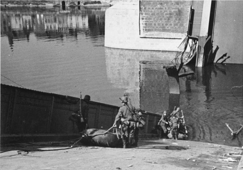 Maastricht. Auf von Holländern gesprengter Brücke werden Floßsäcke zu Wasser gelassen. 10.5.40